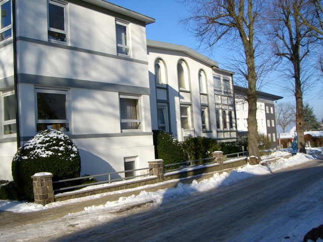 Kinderkurheim Antoniushaus, nun Fachklinik Maria Meeresstern, Niendorf/Ostsee, Timmendorfer Strand